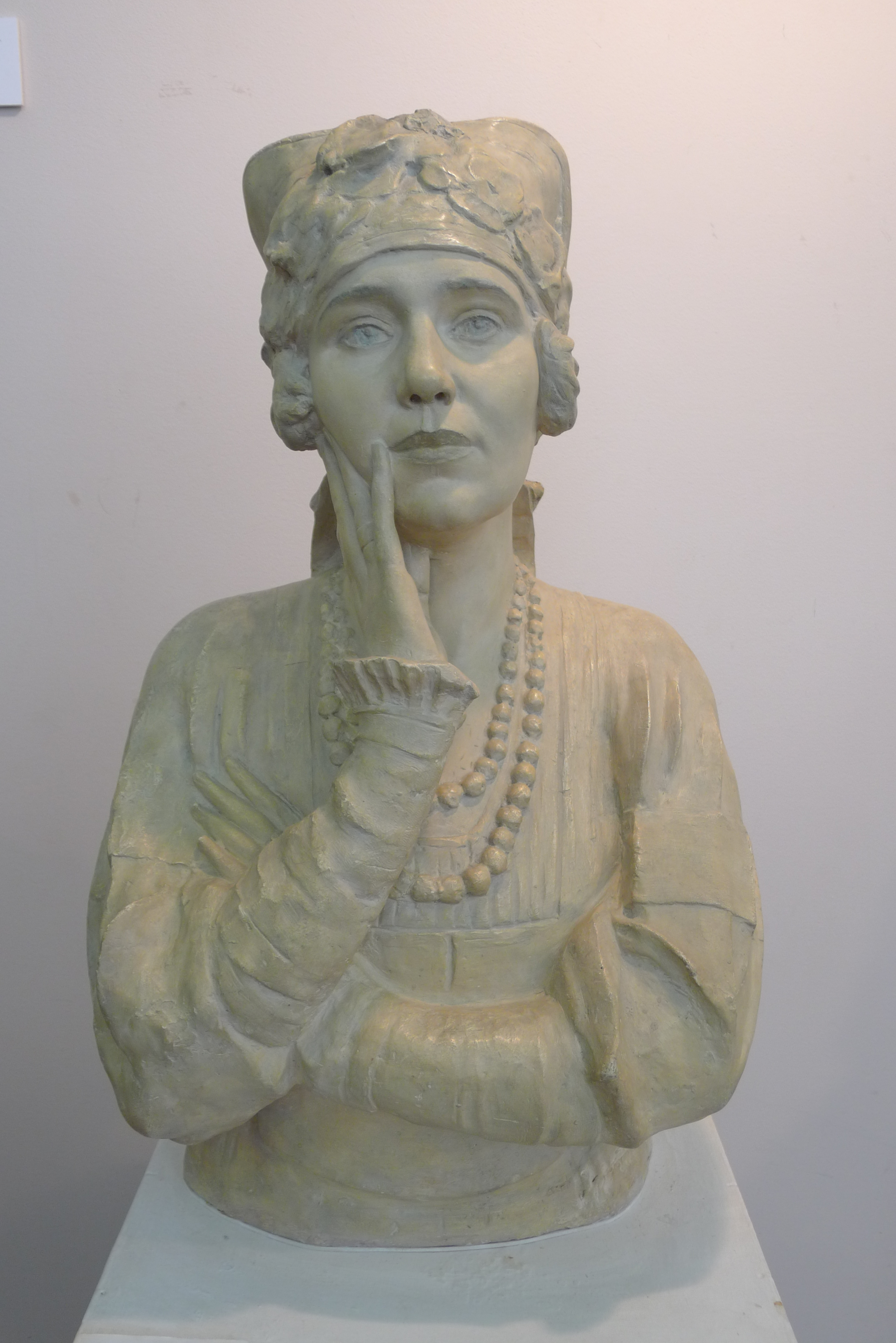 Конёнков С. Т., Женщина в русском сарафане (портрет Н. Плевицкой)